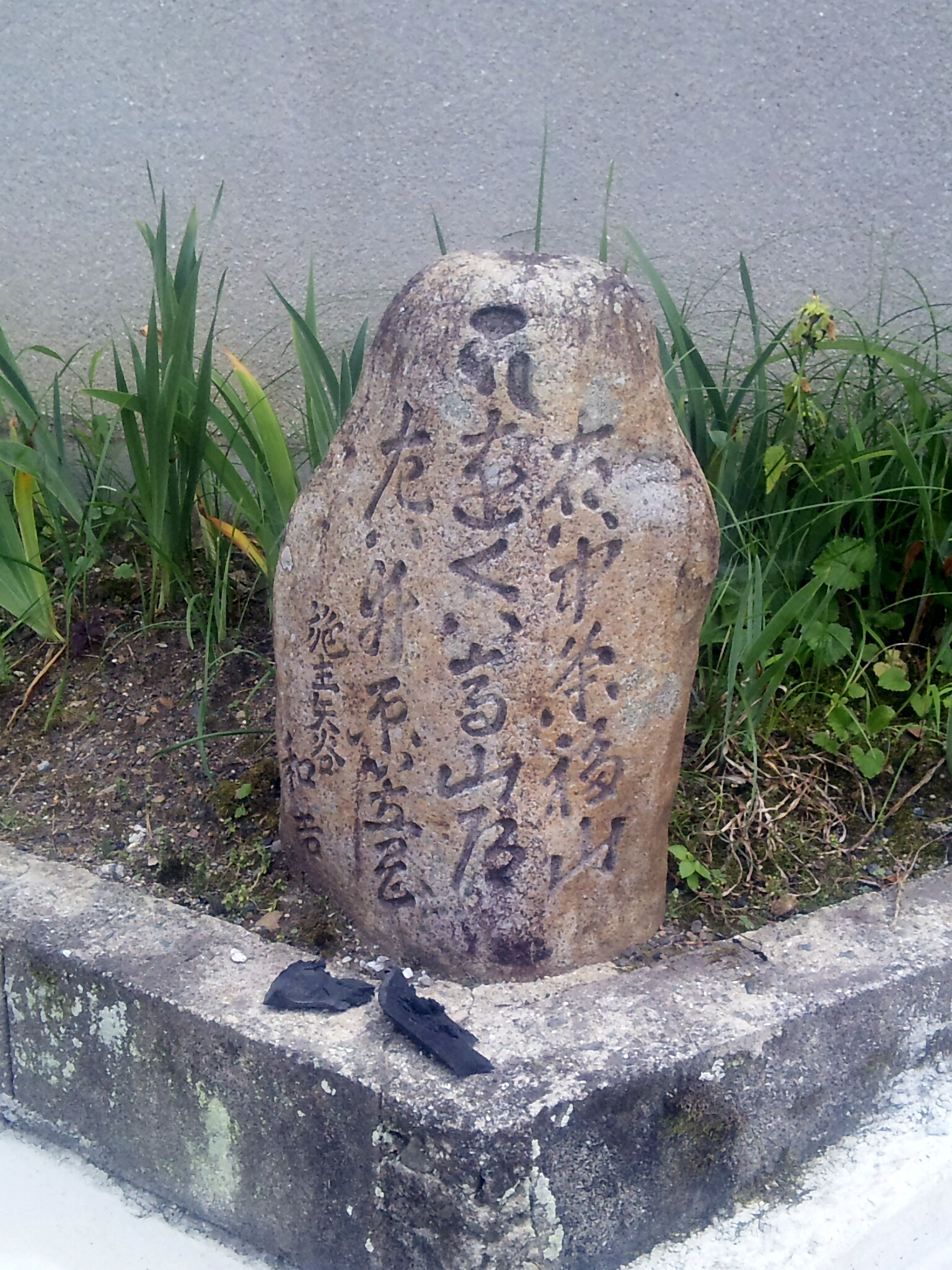 岡山県井原市芳井町吉井の旧東城往来沿いにある道標。かつて備中吉井から備後福山（現：広島県福山市中心部）へ通じる道があったことを示している。